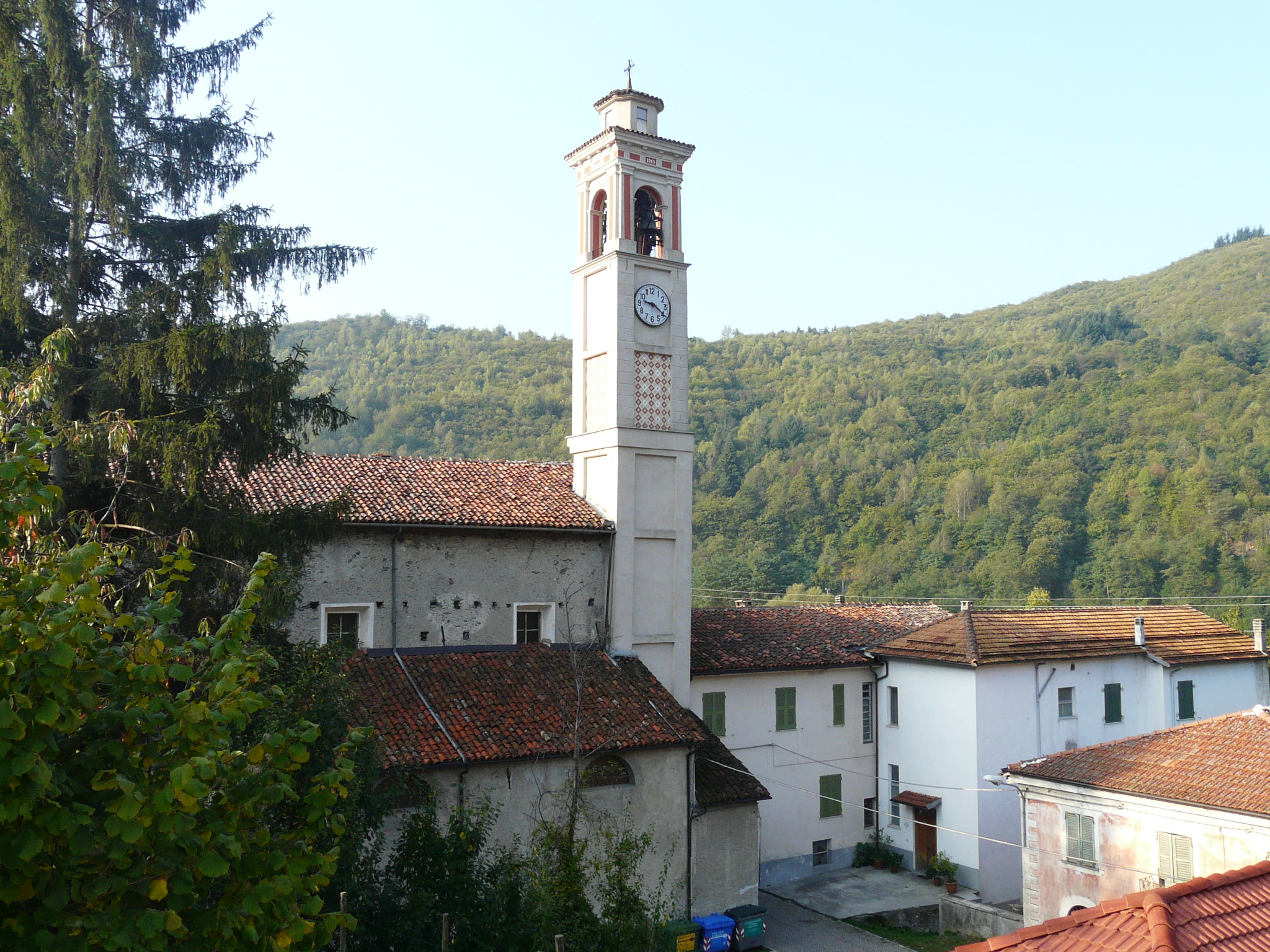 Chiesa di Sant'Antonio Abate, Murialdo, Liguria, Italia